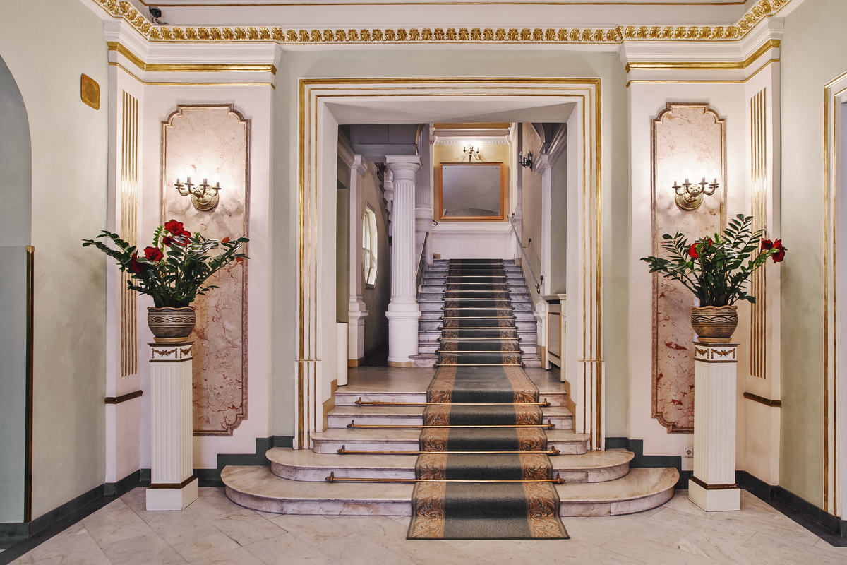 Klatka schodowa Grand Hotel Kraków